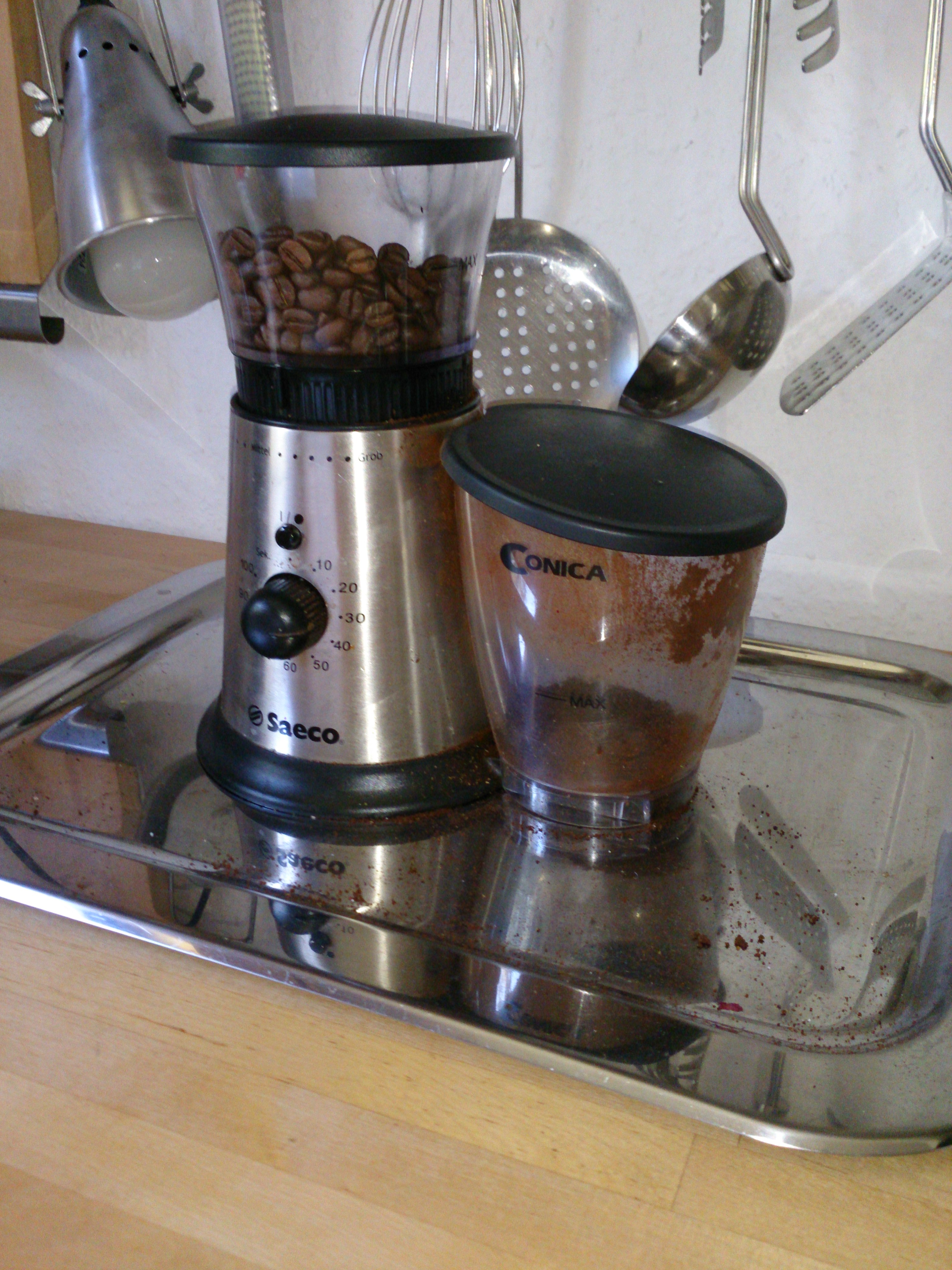 Saeco Conica - Kaffeemühle - Coffeemill III